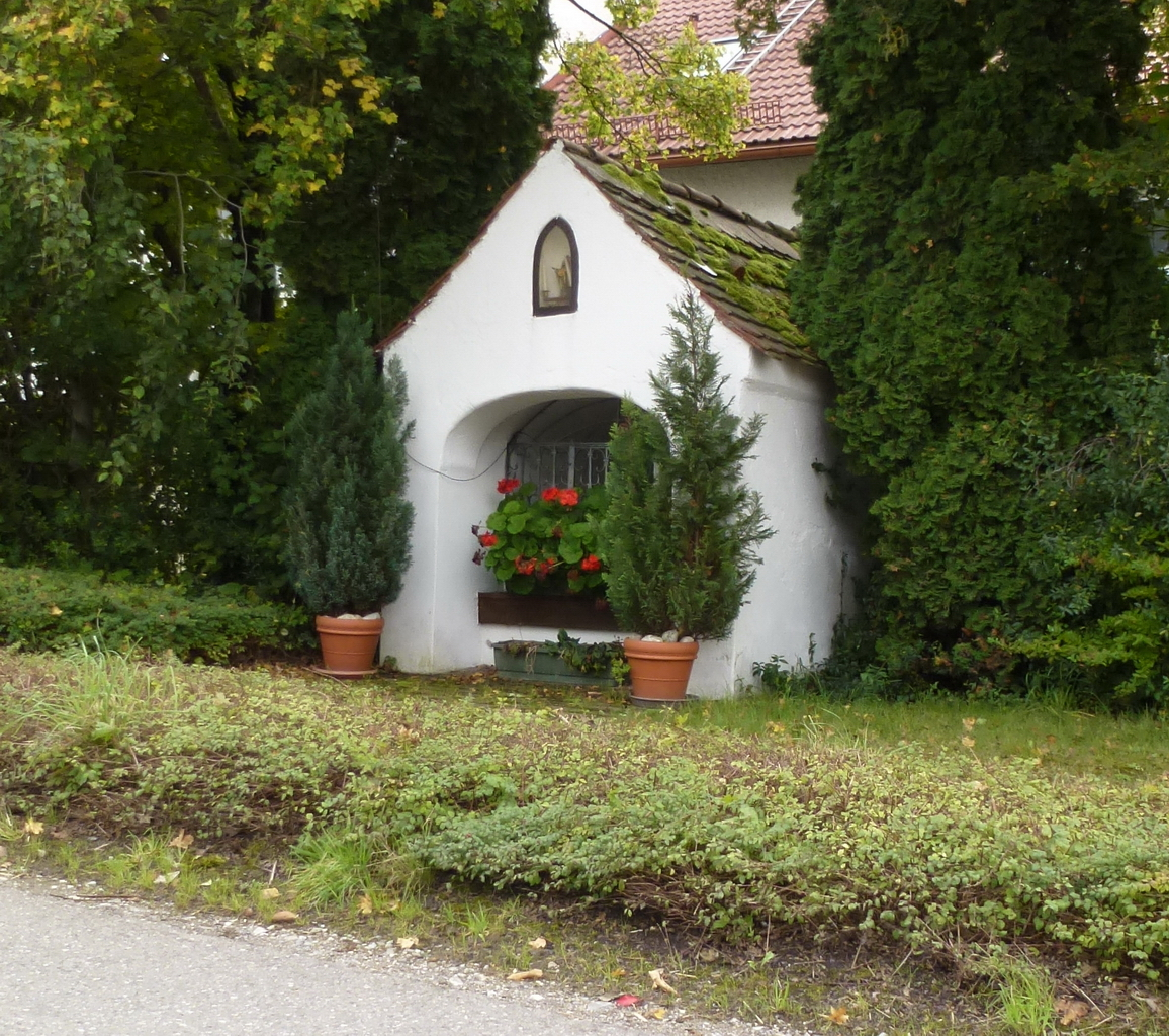 Kleine Kapelle an der Parsbergstrasse in Richtung Holzkirchen, früher freistehend, heute von den umgebenden Siedlungshäusern durch Bepflanzung optisch getrennt.This is a photograph of an architectural monument.